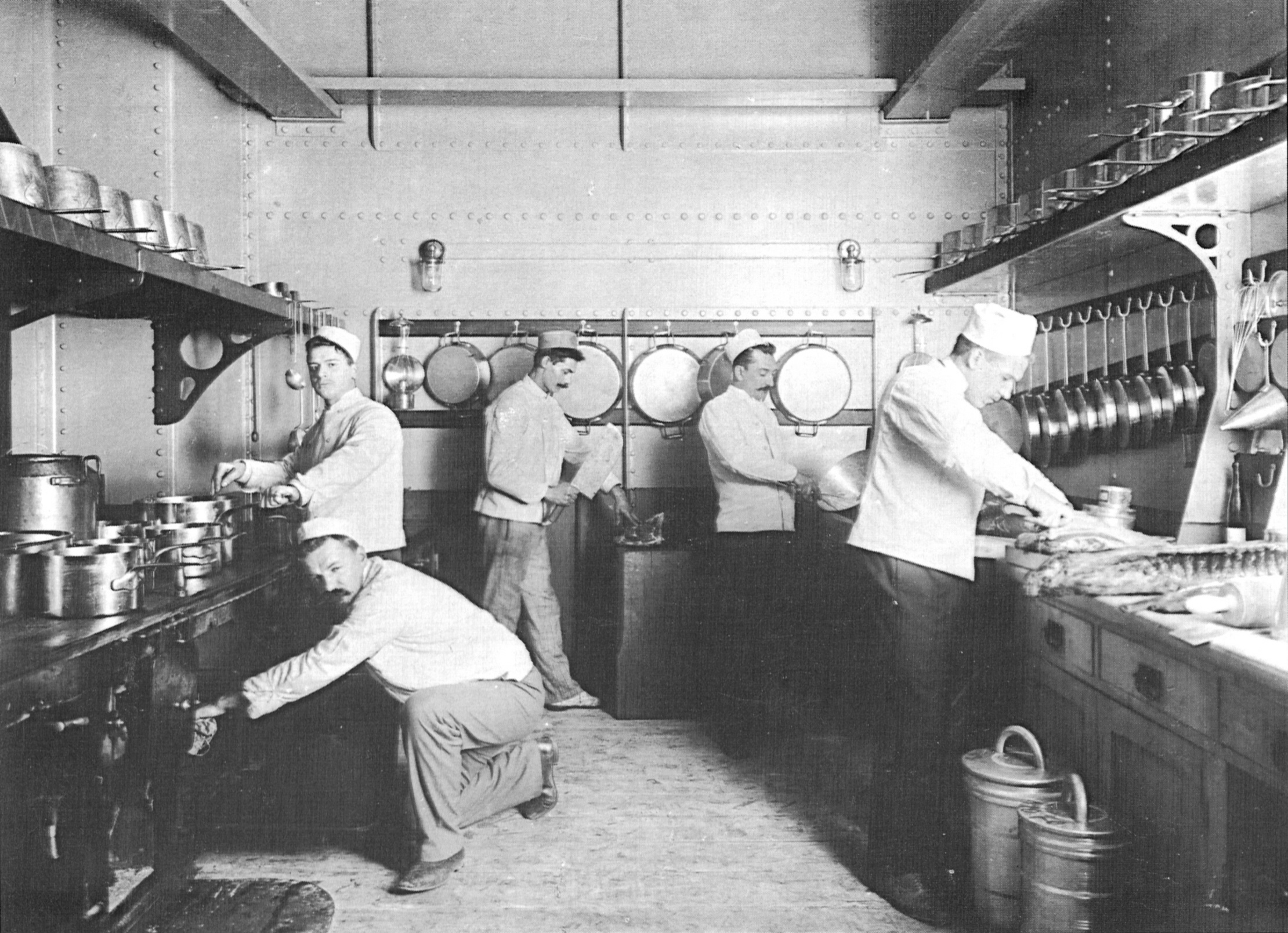 In der Küche der "S.S. Africa"